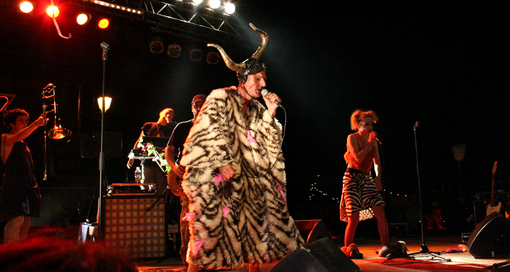 Raoul Petite, groupe de rock agricole sophistiqué, en concert le 28 avril 2007 à L'Isle-sur-la-Sorgue, Vaucluse, France